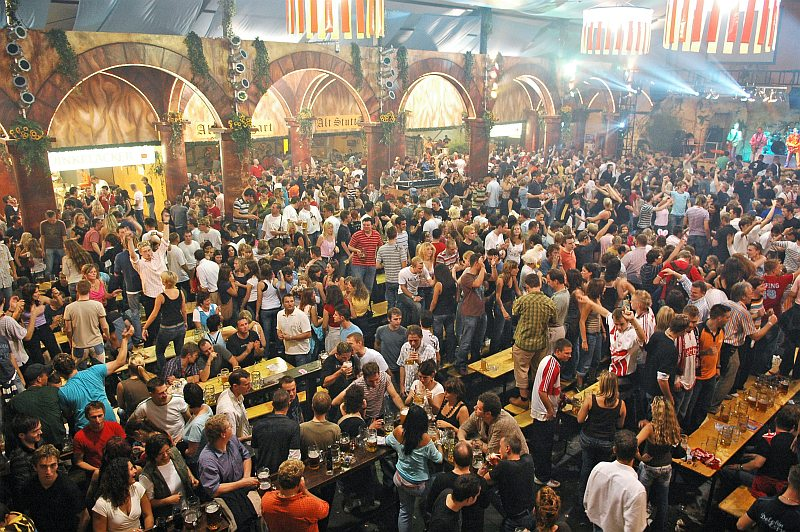 Cannstatter Volksfest Arcadia-Zelt von Innen